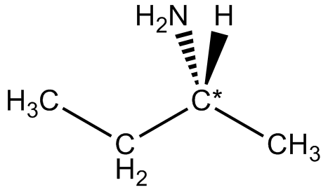 (R)-2-butanamida